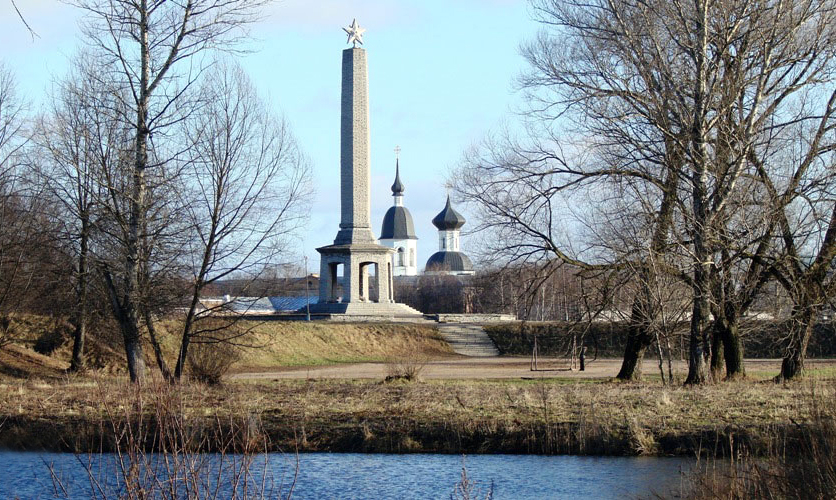 Великолукская крепость, Памятник и вид на город